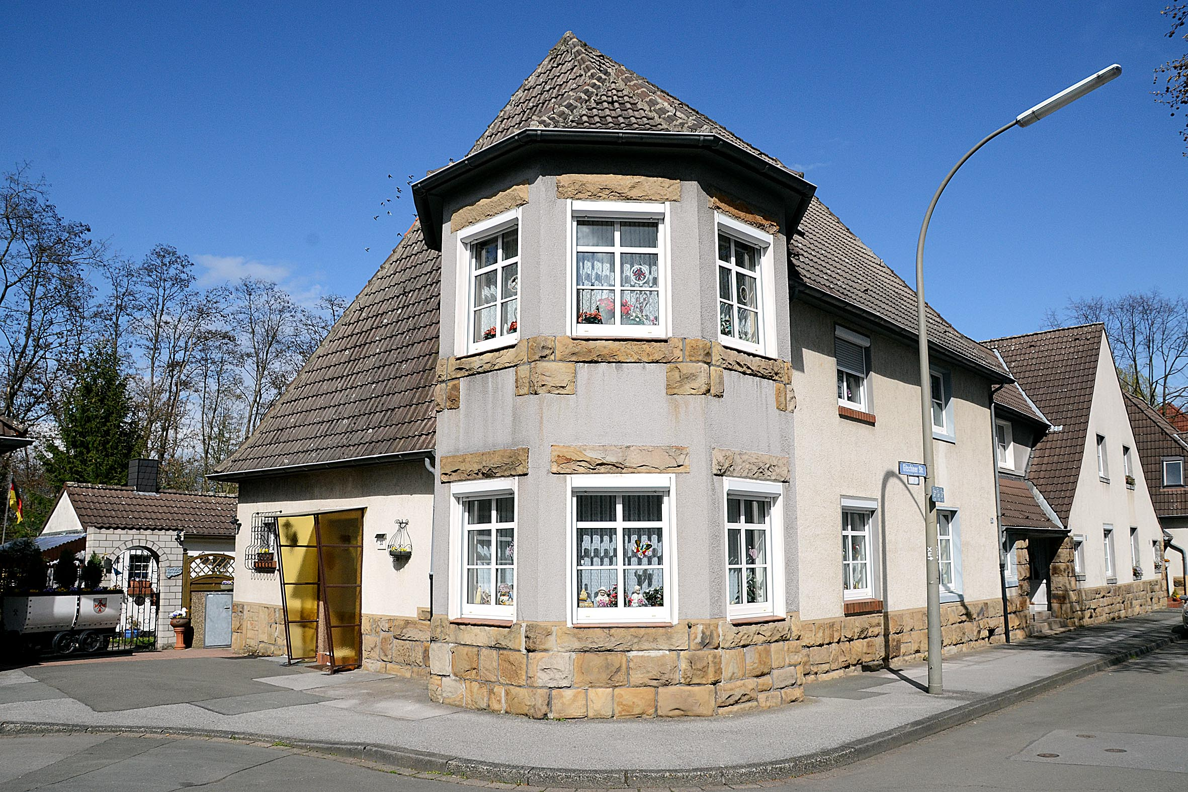 Kolonie Kirdorf: Markantes Siedlungseckhaus in Dortmund-Eving, Gitschiner Straße / Wrangelstraße